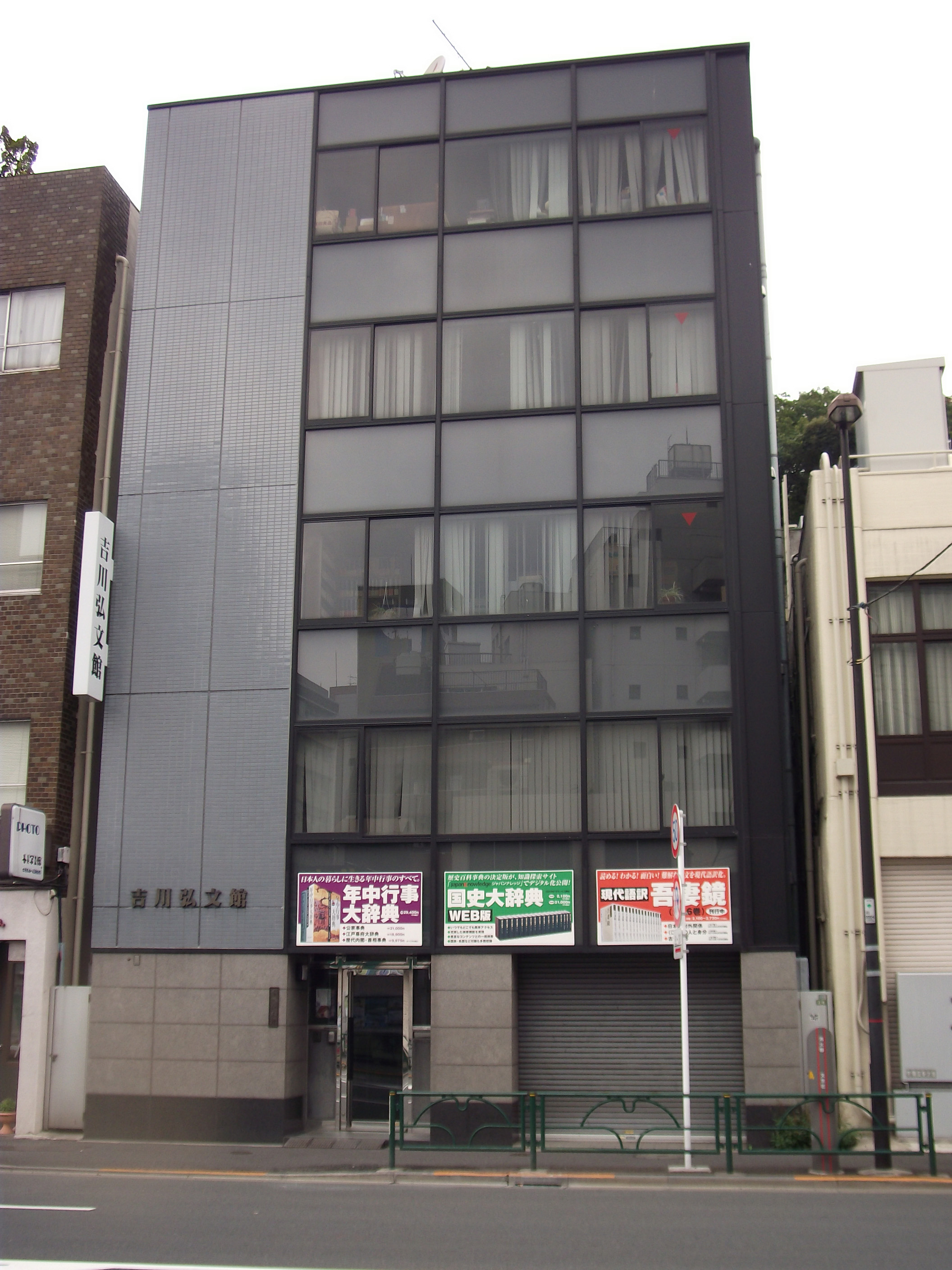 吉川弘文館（東京都文京区本郷）。